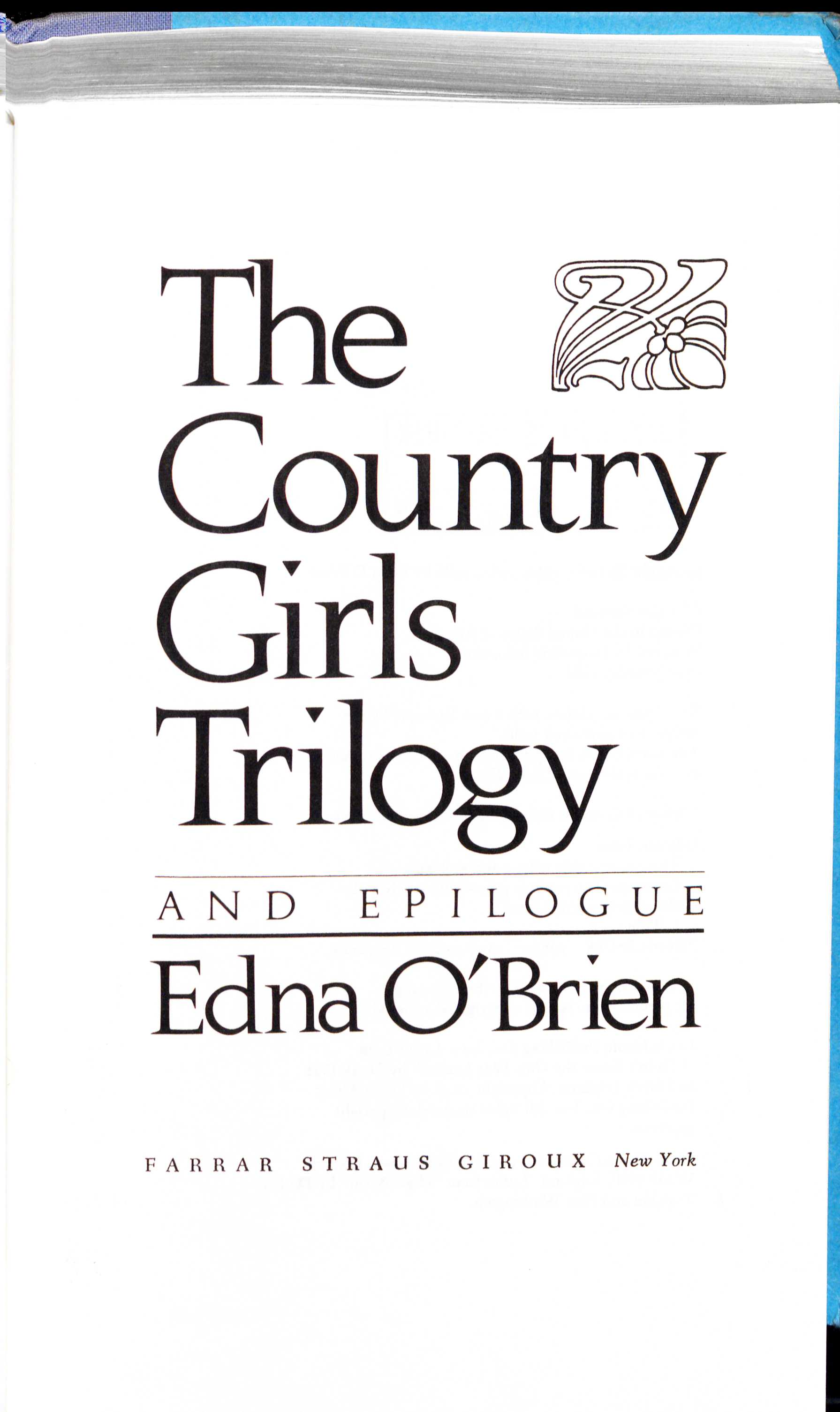 Edna O'Brien The Country Girls Trilogy and Epilogue 1986 title